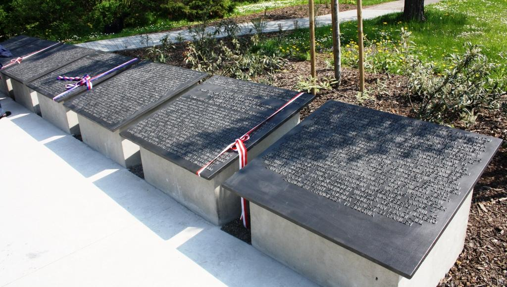 Tablice przy pomniku na Konteszyńcu w Czeskim Cieszynie